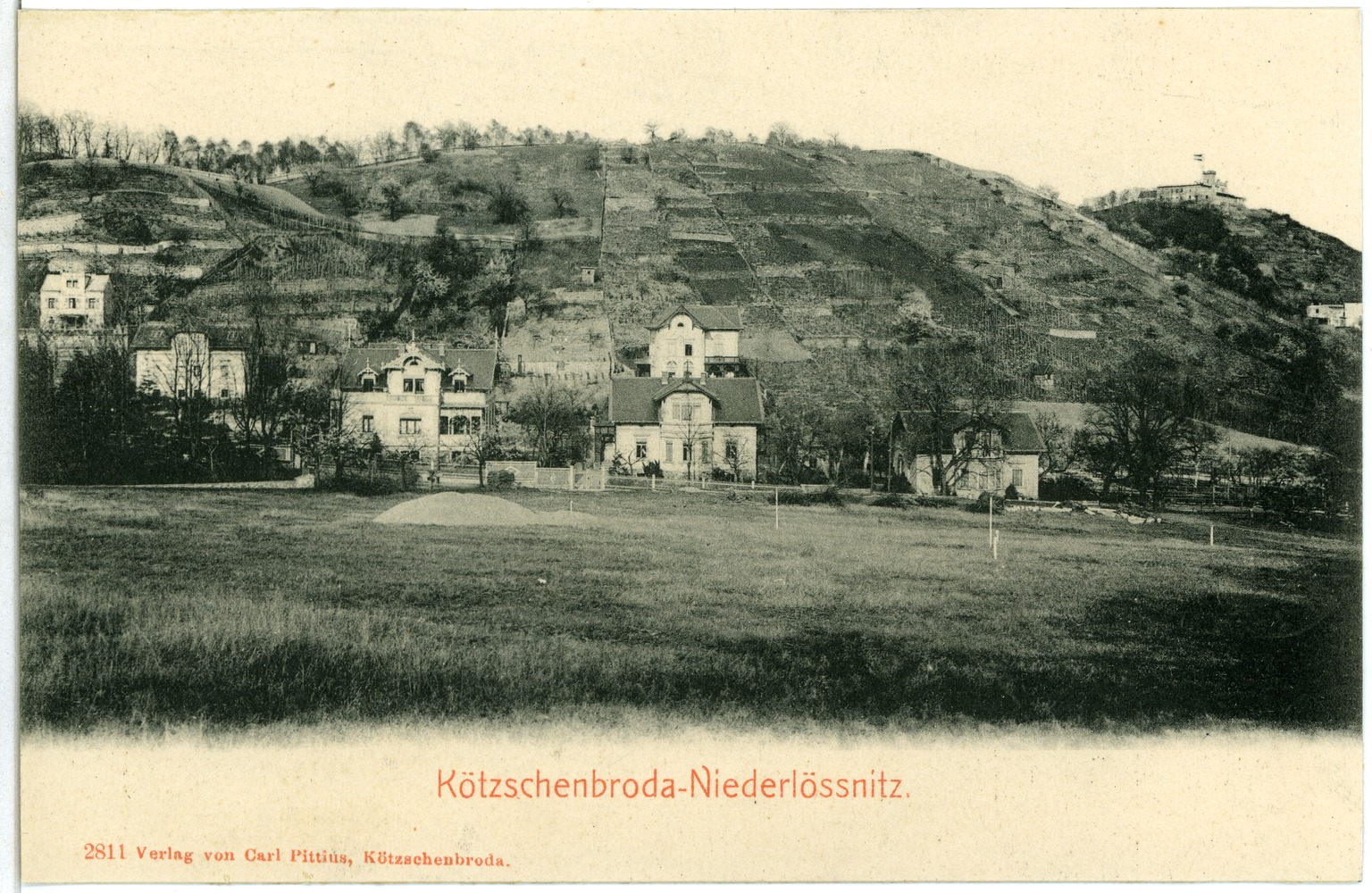 Kötzschenbroda; Niederlößnitz This postcard is from publisher Brück & Sohn in Meißen ( postcard has a unique number 02811 and is available in a higher resolution at the publisher. This images was uploaded in a cooperation project between Wikipedians and the publisher.